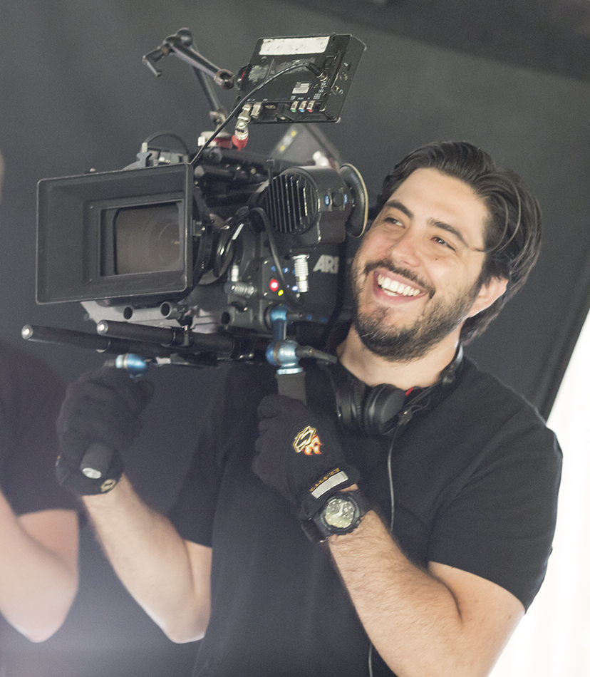 Manuel Concha Foto: Caroline Romare